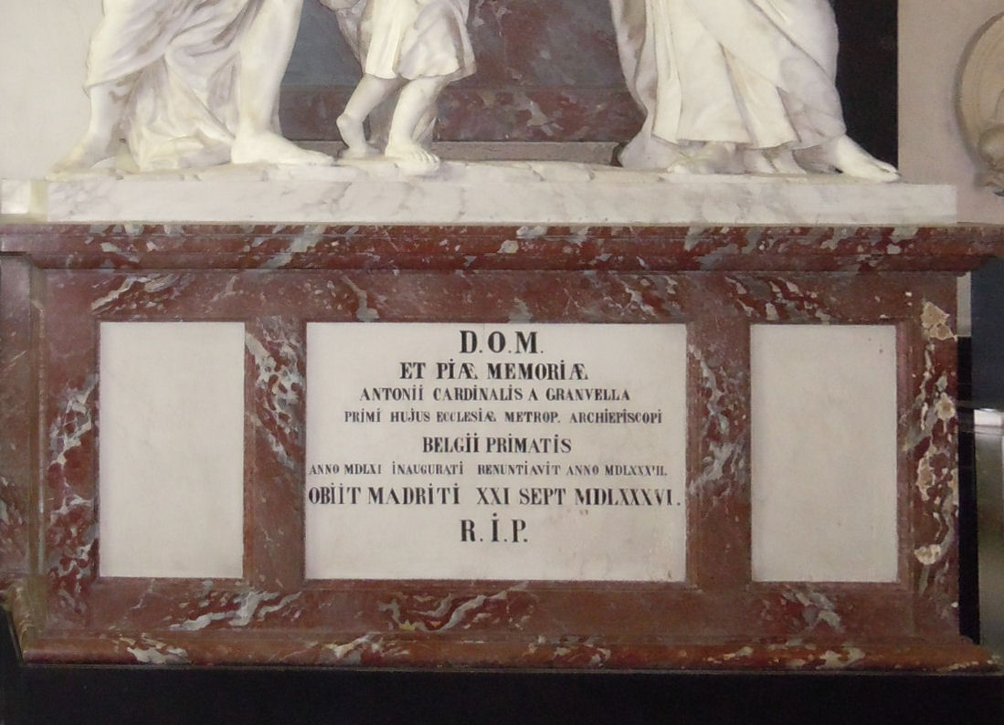 Tombes Kathedraal